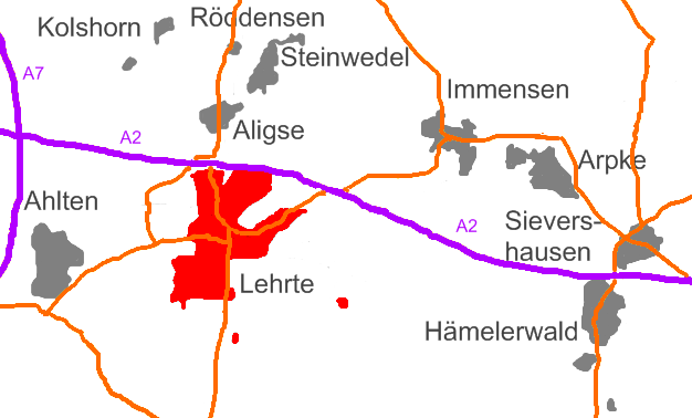 Lage von Lehrte als Ortsteil von Lehrte